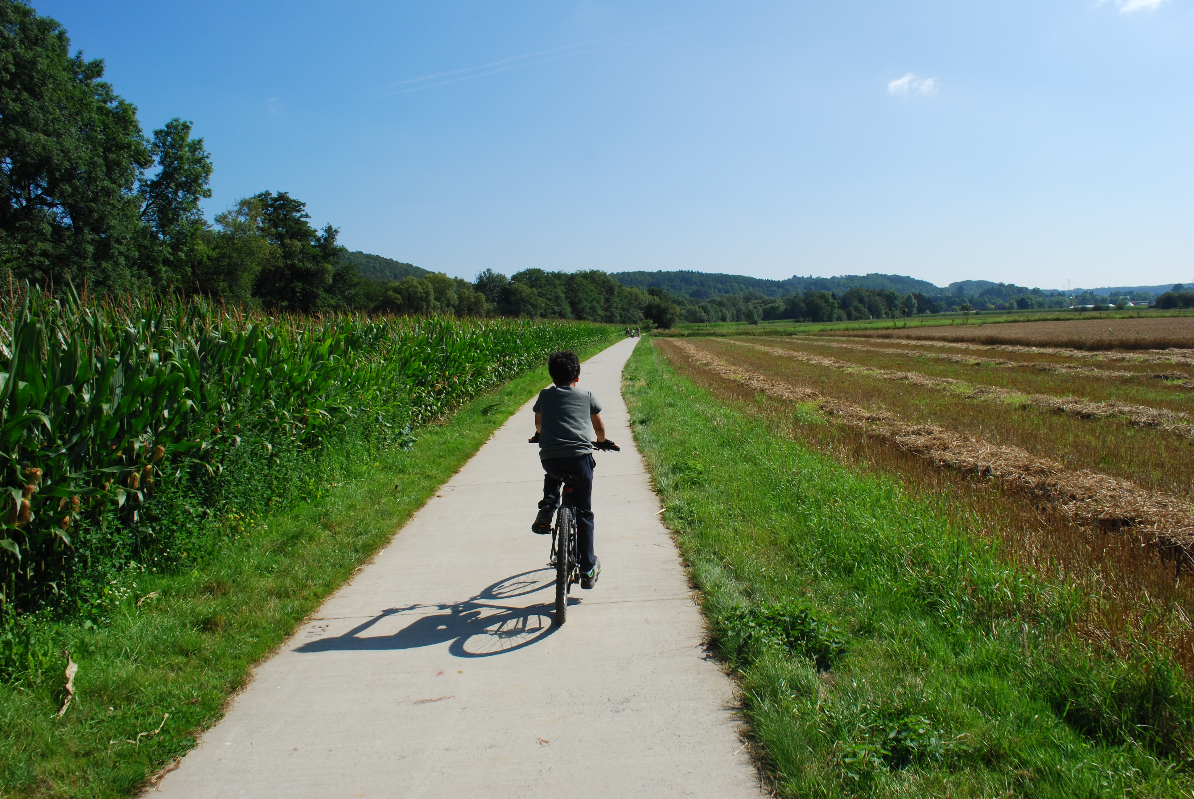 La piste cyclable au bord de l'Ourthe à Barvaux.